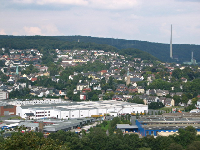 Alt-Wetter in der Stadt Wetter (Ruhr); Blick übers Schöntal zum Harkortberg, hinten rechts das Herdecker Cuno-Kraftwerk